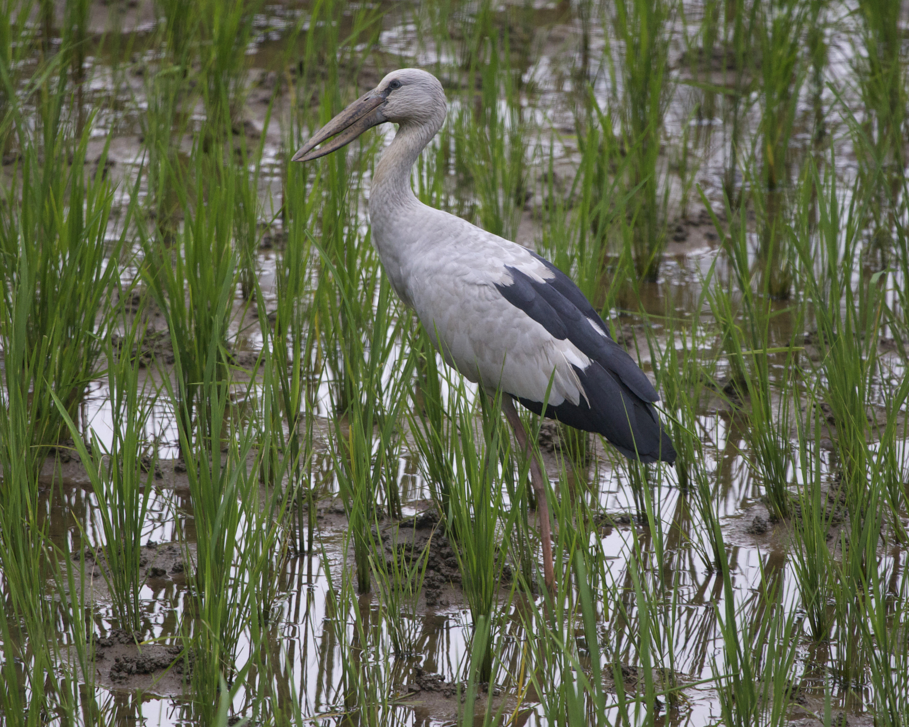 kand ao 690V9171